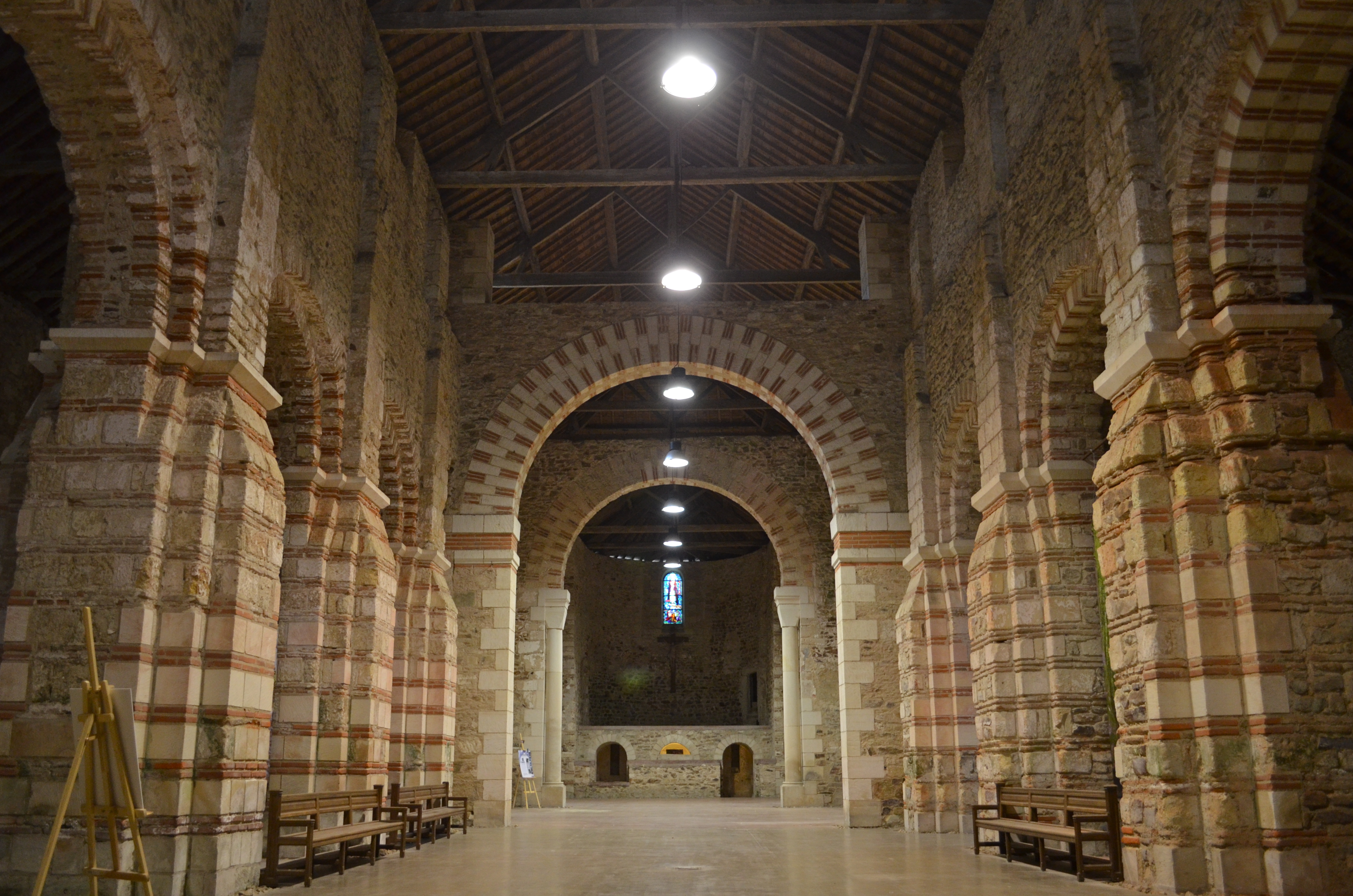 Abbatiale de Saint-Philbert-de-Grand-Lieu (Loire-Atlantique)